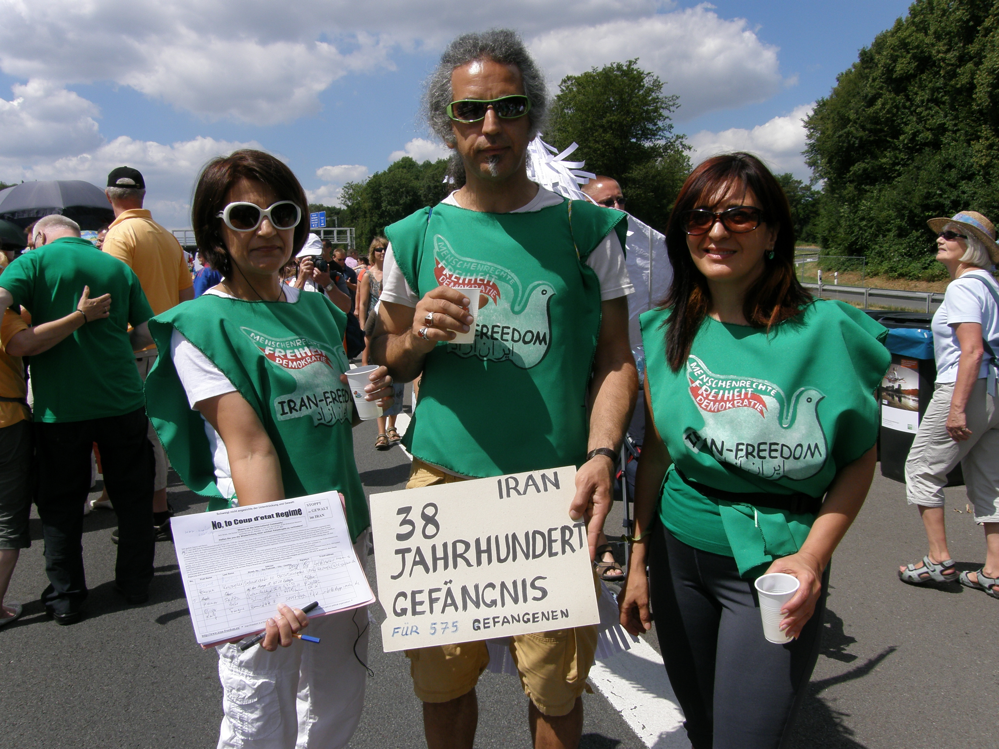 Still-Leben Ruhrschnellweg, Standort Bochum-Harpen